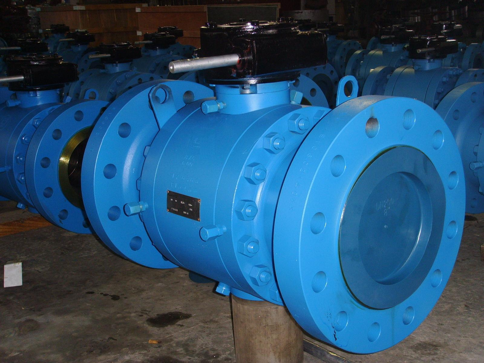 6 Moly valves.